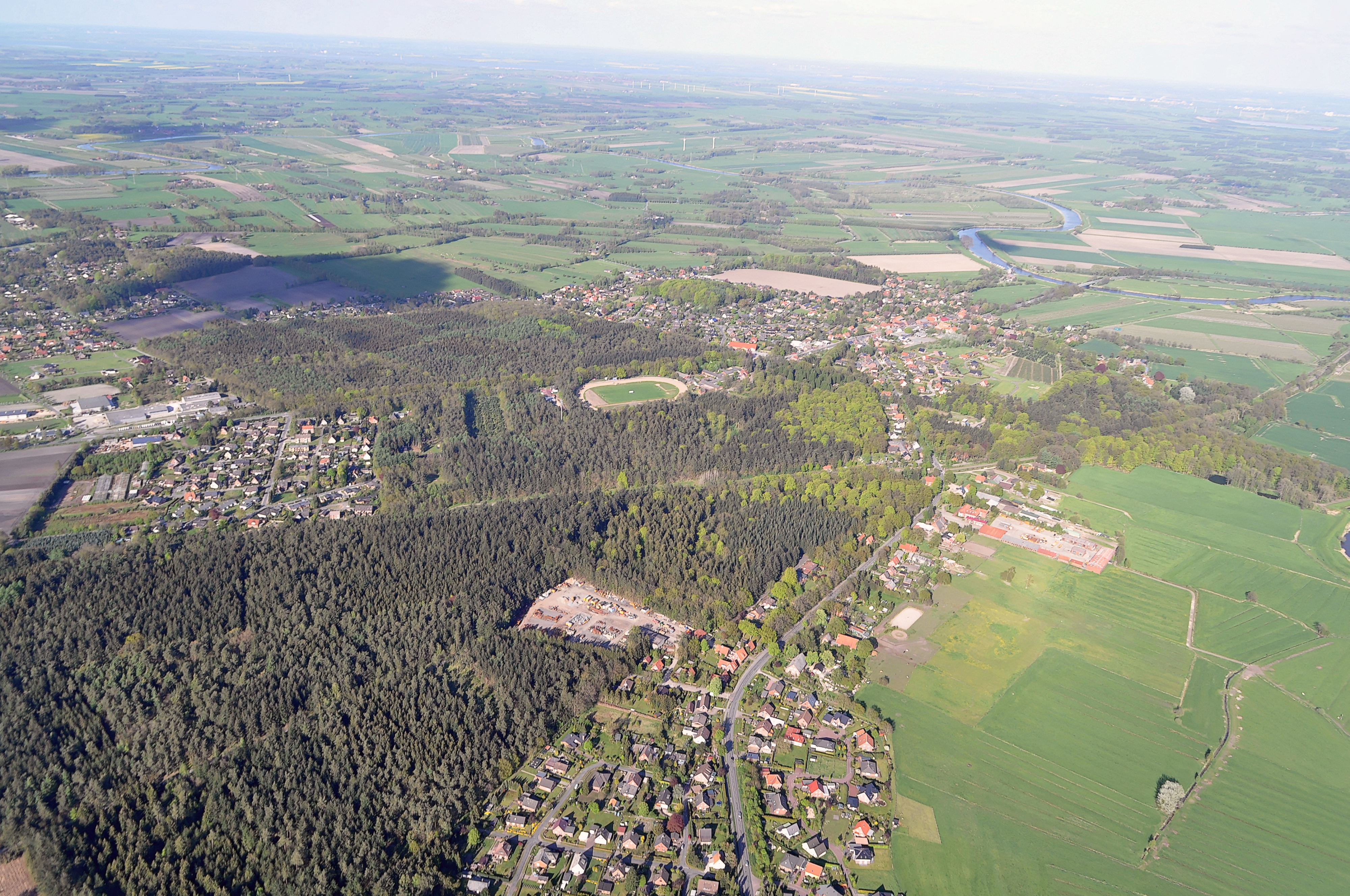 Luftbilder von der Nordseeküste 2012-05